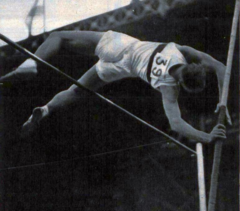 Karl Sutter, champion d'Europe de saut à la perche en 1938.